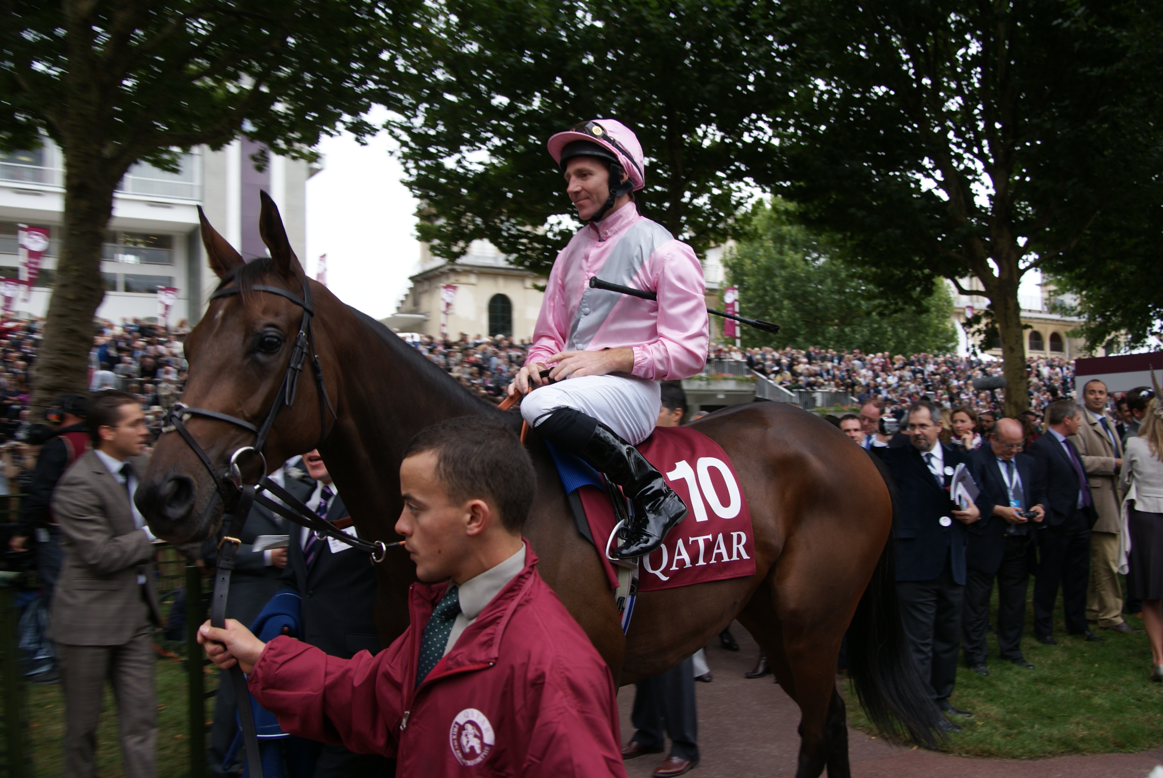 2009年10月4日凱旋門賞パドックにて